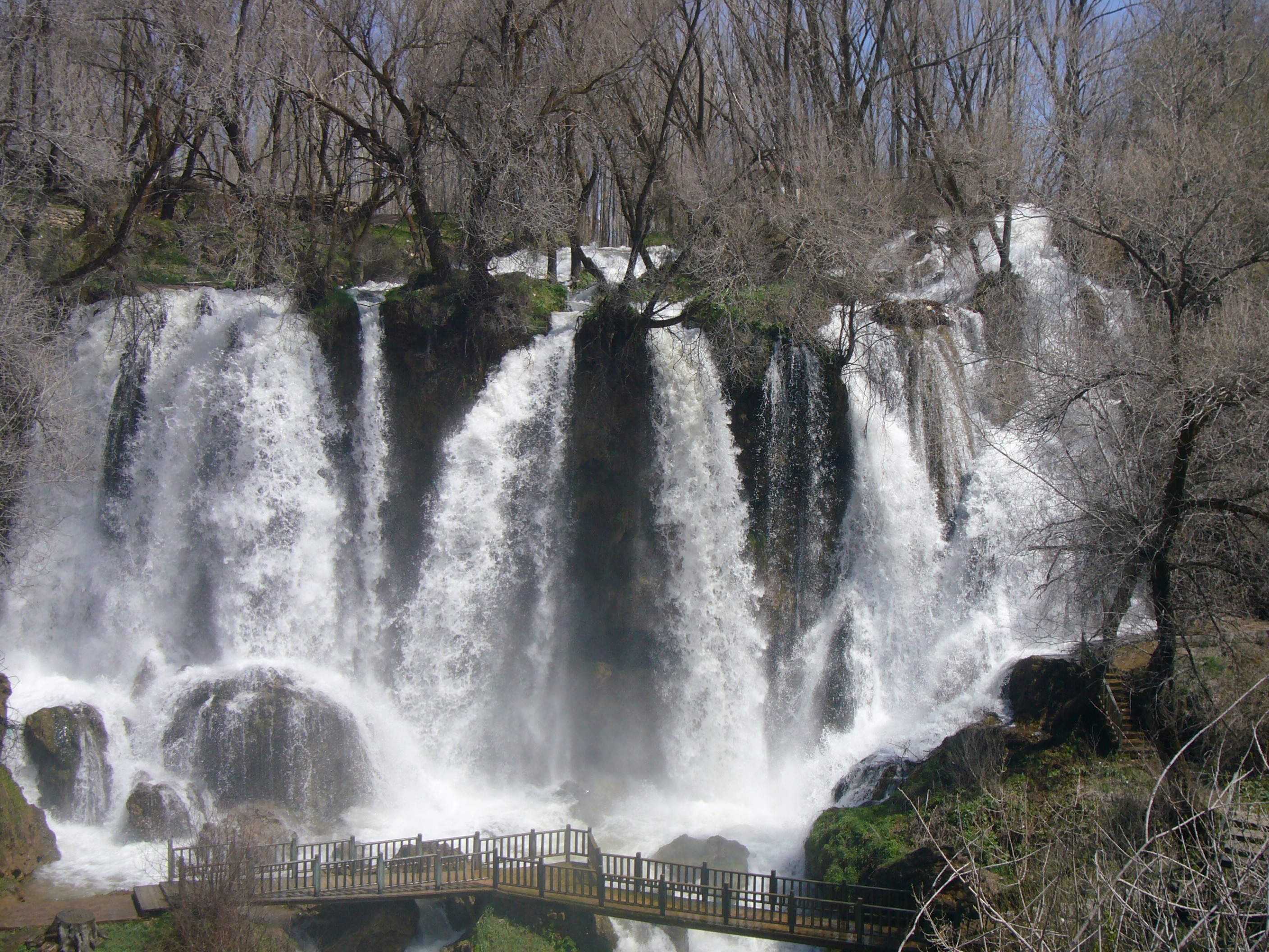 Sızır Şelalesinin 2009-04-18 tarihindeki görüntüsü.